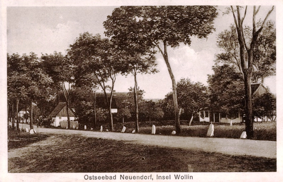 Ansichtskarte Ostseebad Neuendorf, Insel Wollin